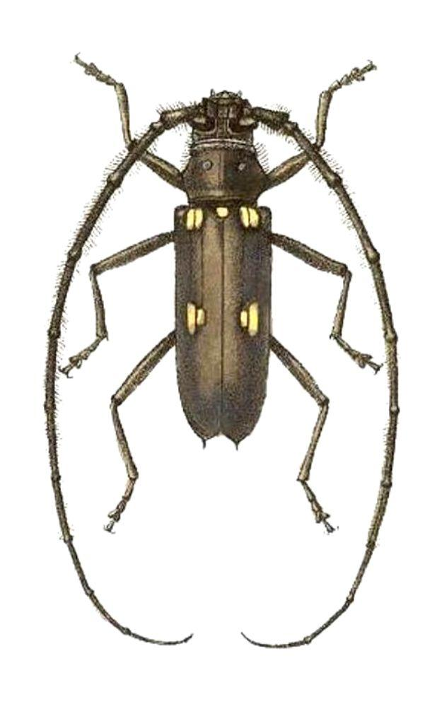 Eburia fuliginea